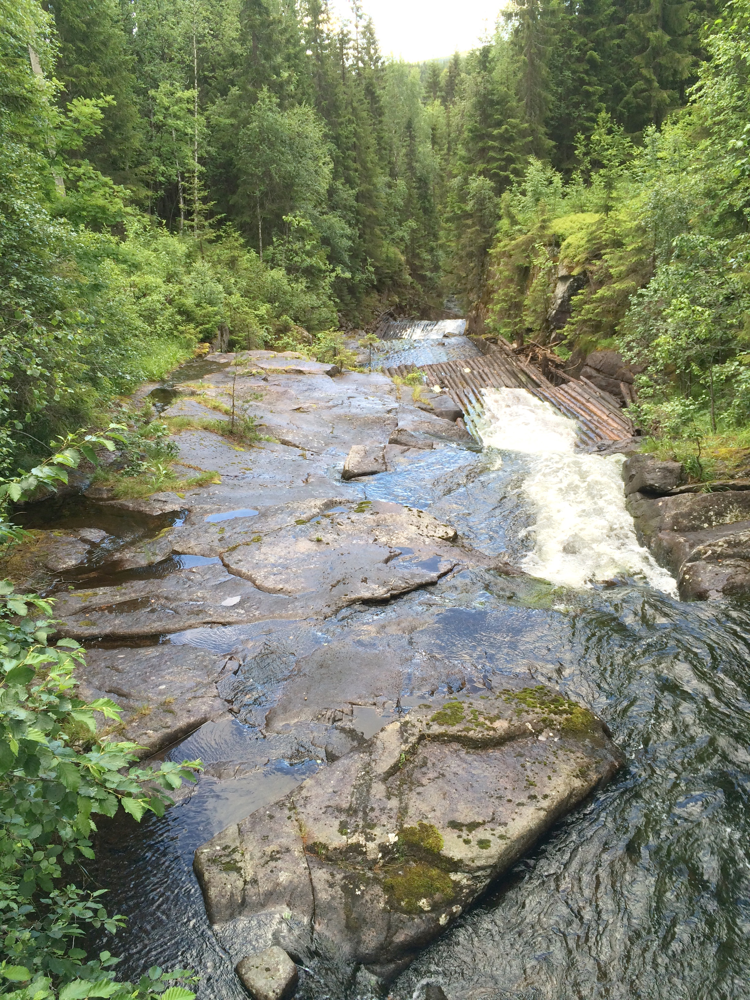 Helvetesfossen i Myrtjernselva